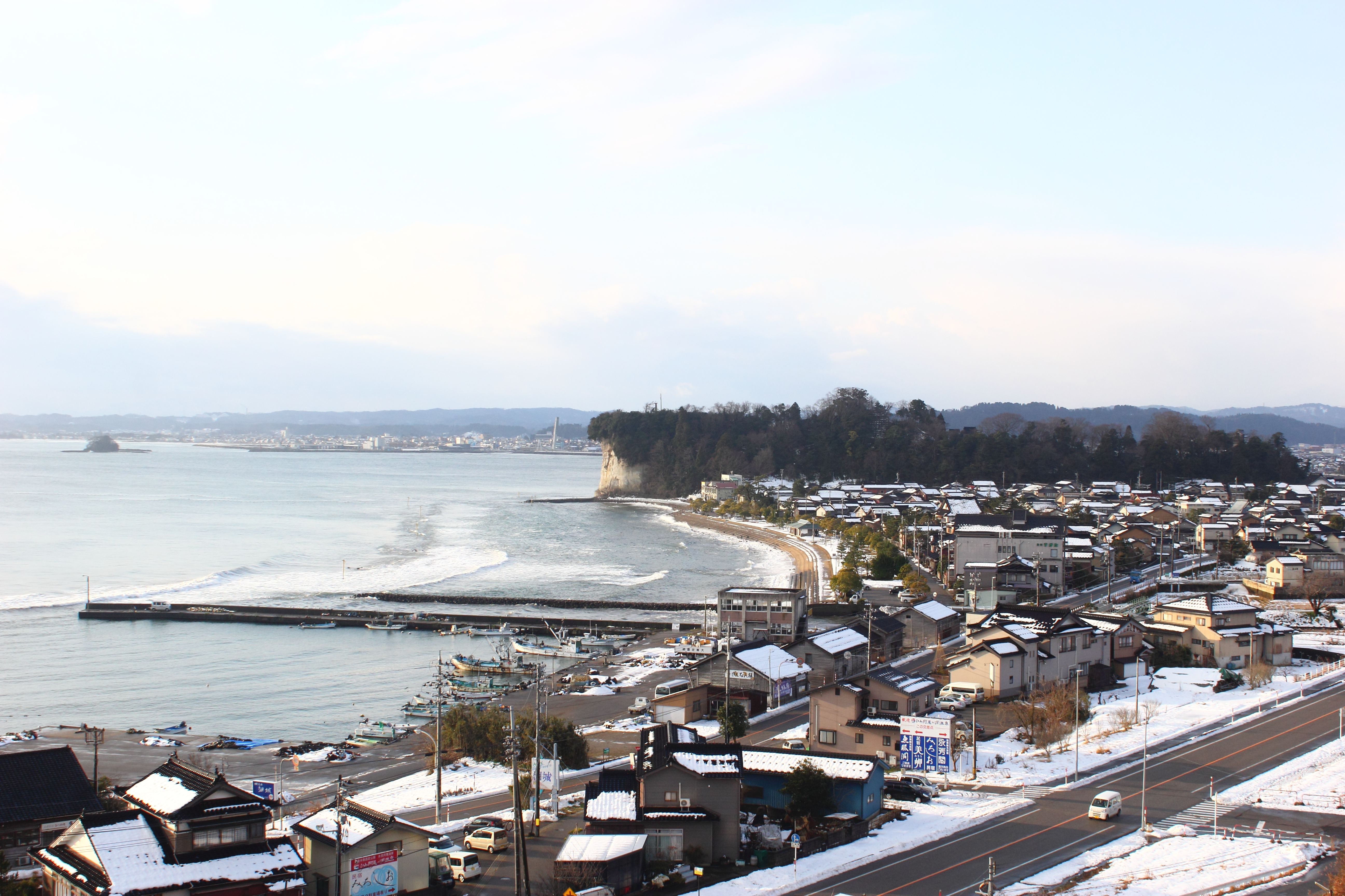 阿尾城跡のある城ケ崎（阿尾漁港側より撮影）